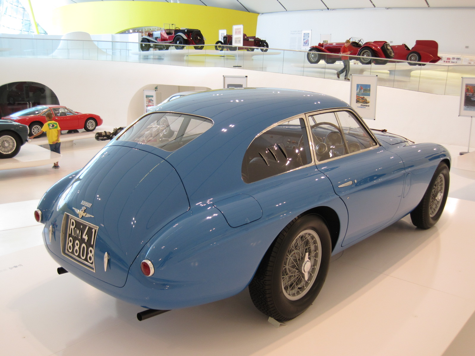 Automobiles in Enzo Ferrari Museum in Modène - Ferrari 166 MM - Coupé Touring V12 - 1949